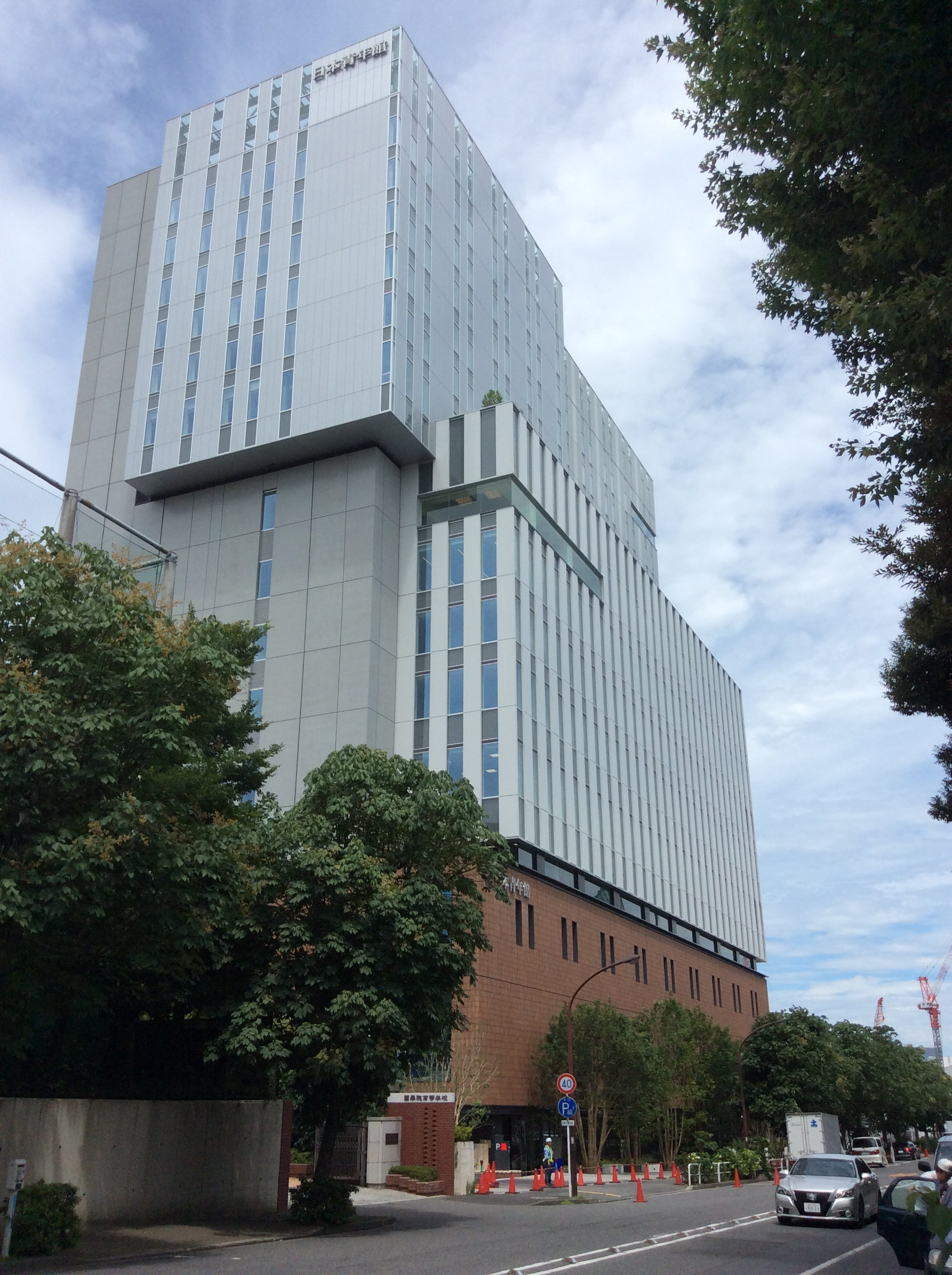 日本青年館ホテル